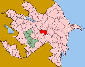 Map of Azerbaijan showing Zardab (Zərdab) rayon.